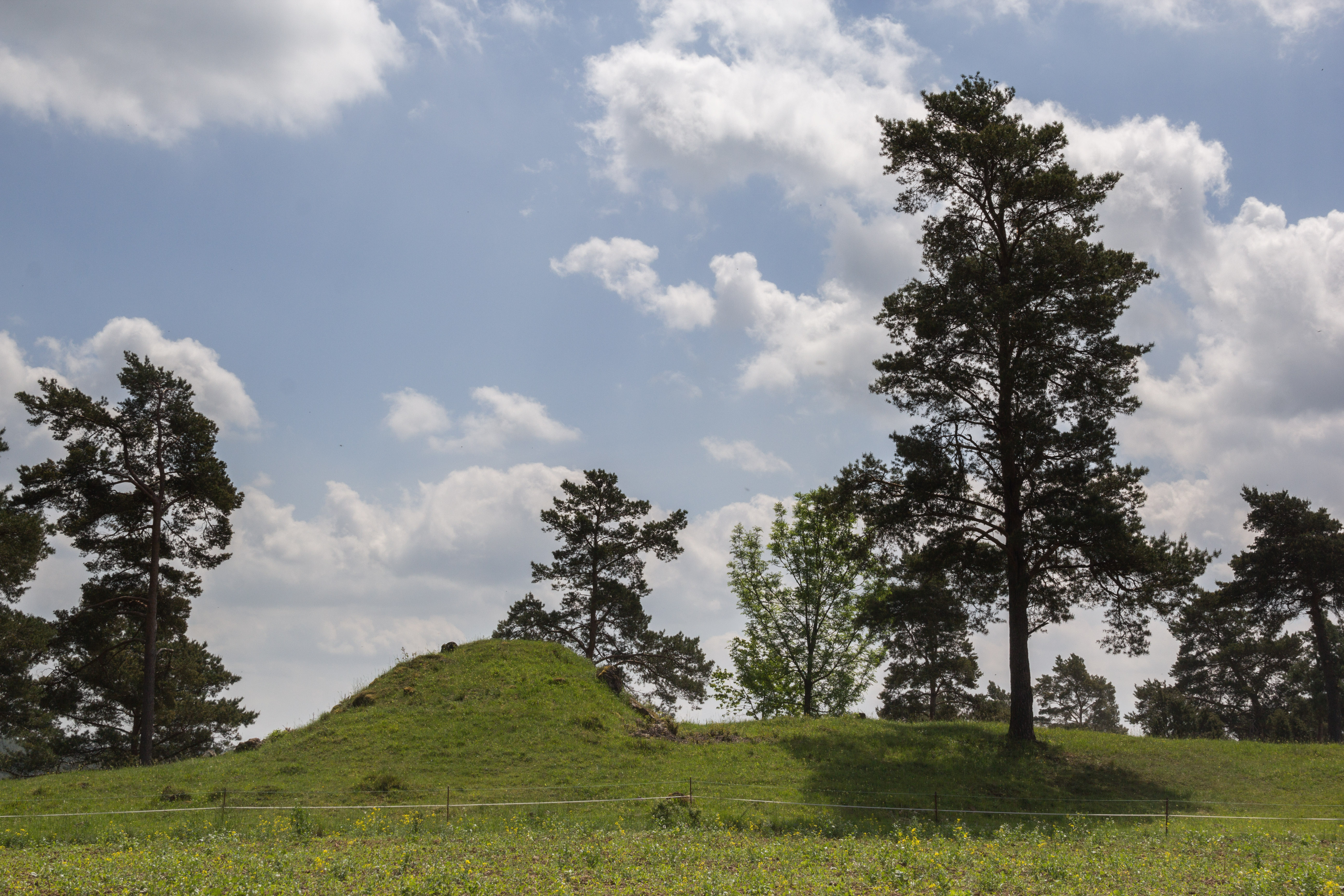 Ohrenbach, Weide bei Ohrenbach, Naturpark Fränkische Schweiz-Veldensteiner Forst